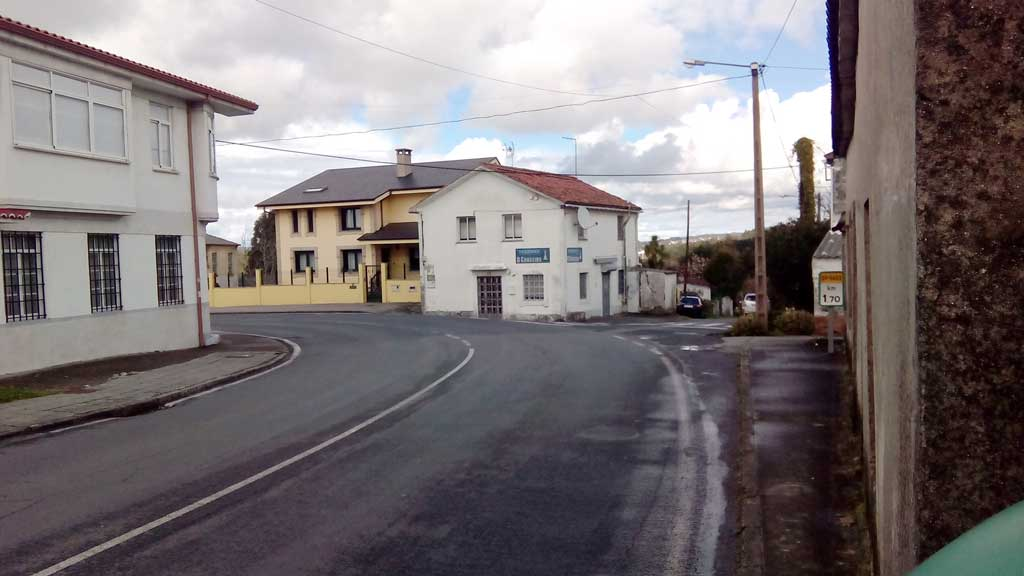 Vista do Calvario, Santa Icía, Ferrol.